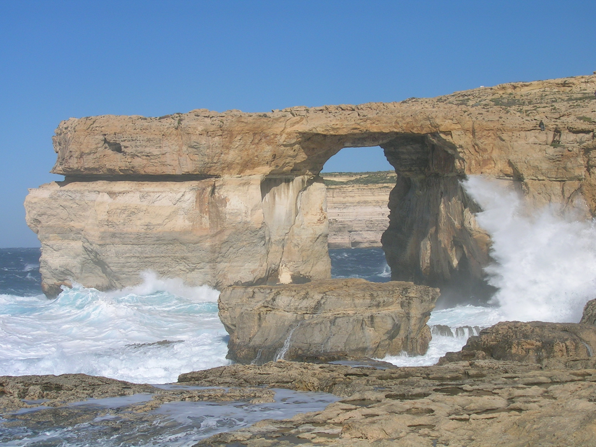 monumento natural